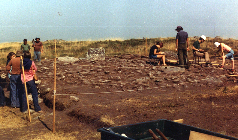 Dolmen 3 at Outeiro de Ante, Baião, Portugal